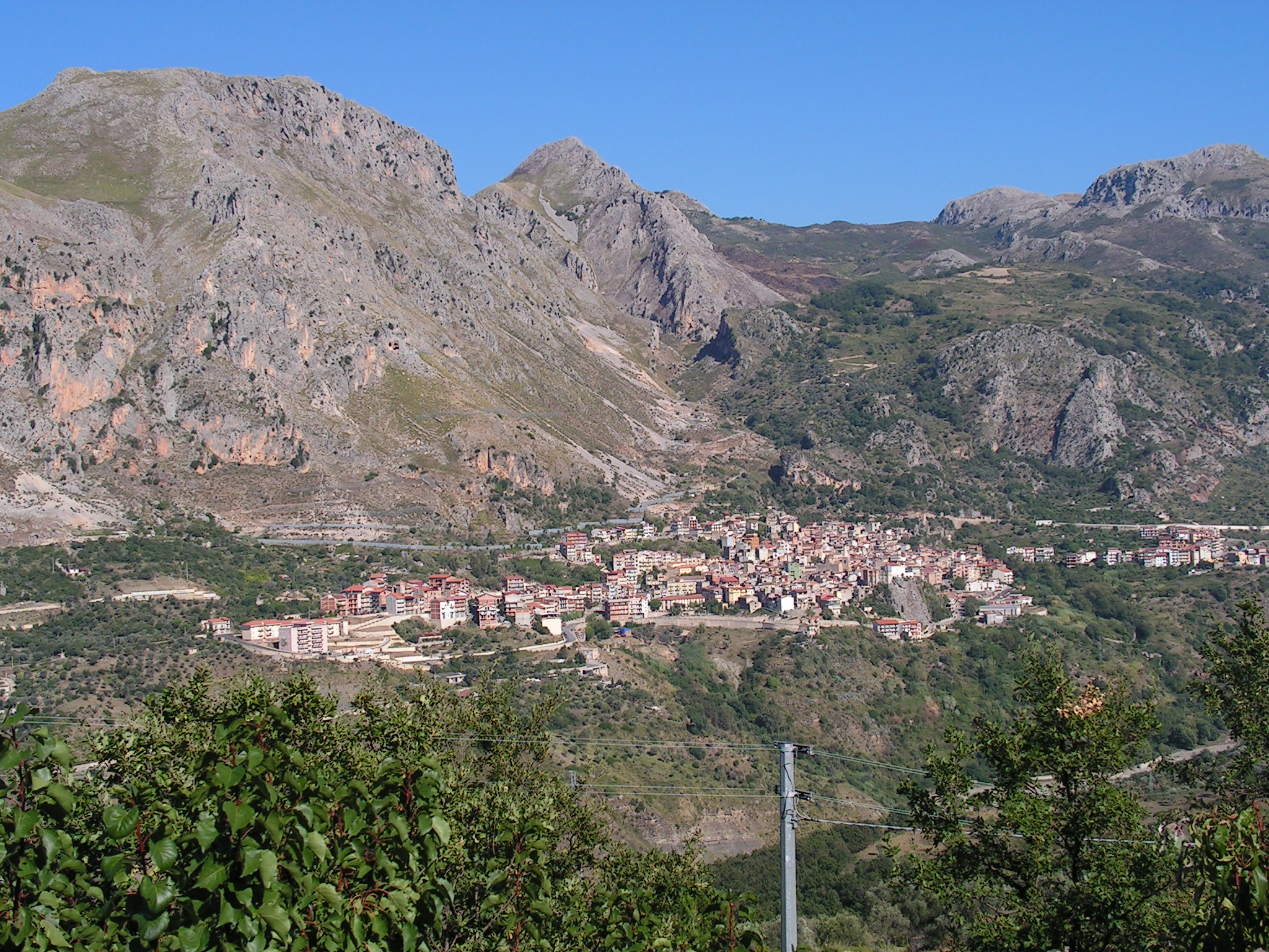 Lombardo Dario Ignazio,Vista di Alcara li Fusi